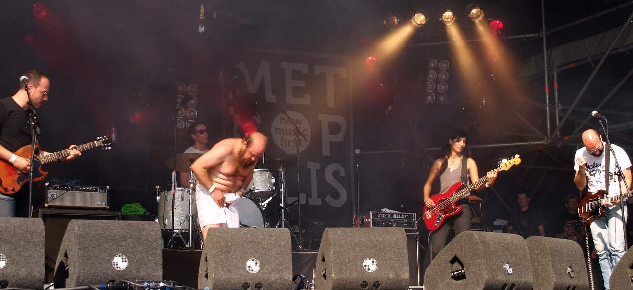 Les Savy Fav spelend op het Metropolis festival in Rotterdam, 2011.